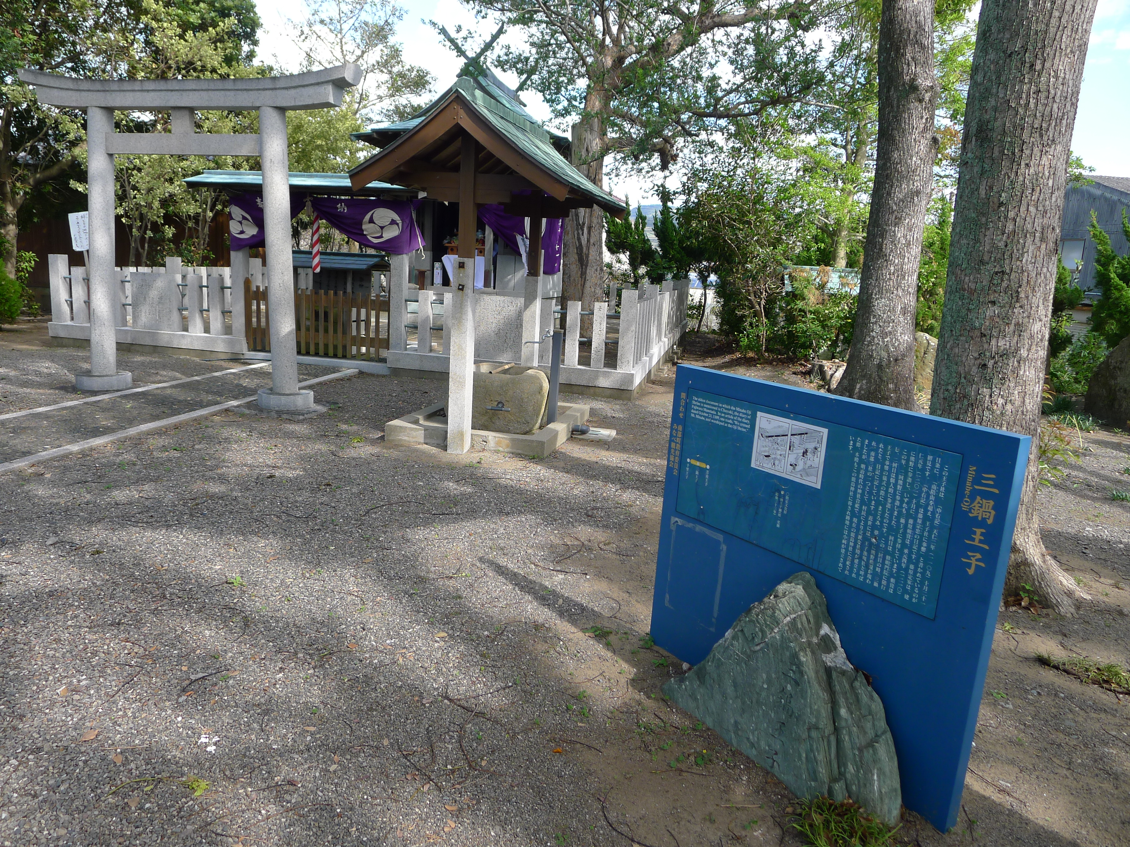 熊野古道・紀伊路の九十九王子の一つ三鍋王子（和歌山県みなべ町）